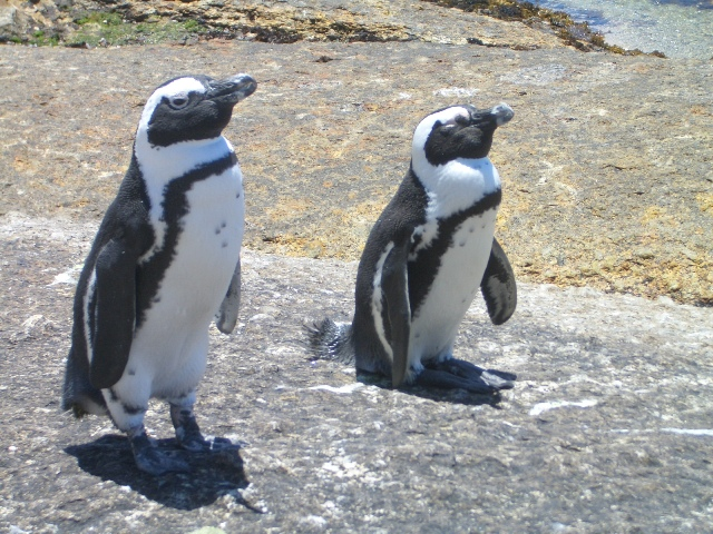 Zwei Brillenpinguine auf der Kaphalbinsel in Südafrika